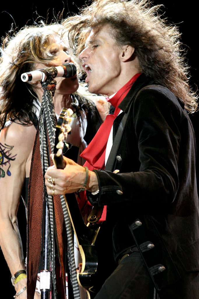 Aerosmith - Steven Tyler, Joe PerrySteven_Tyler